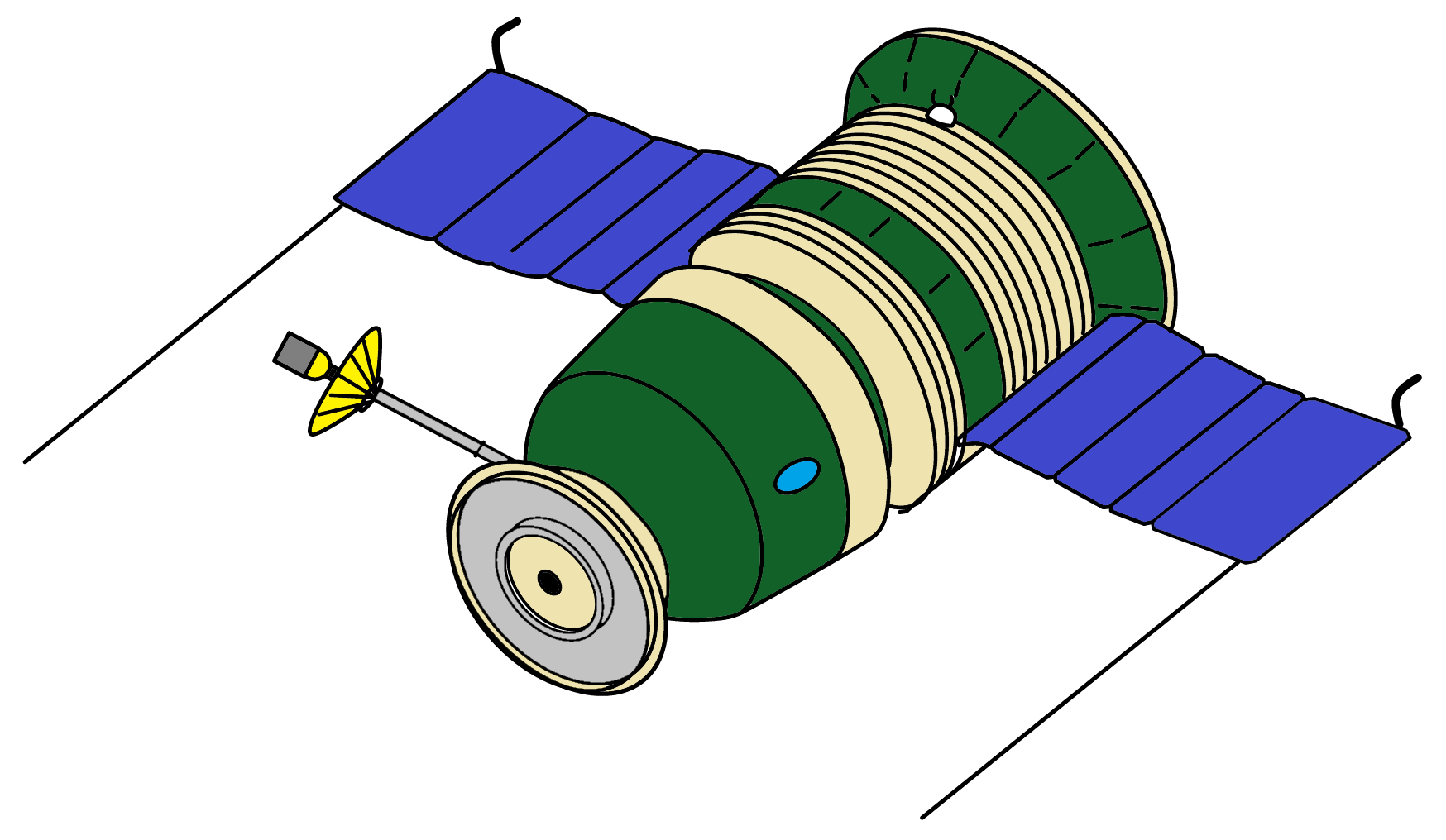 重新上色，更加具視覺感